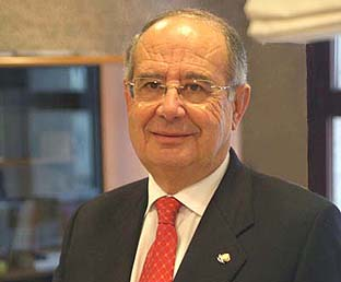 El financiero español Antonio Pérez Lao